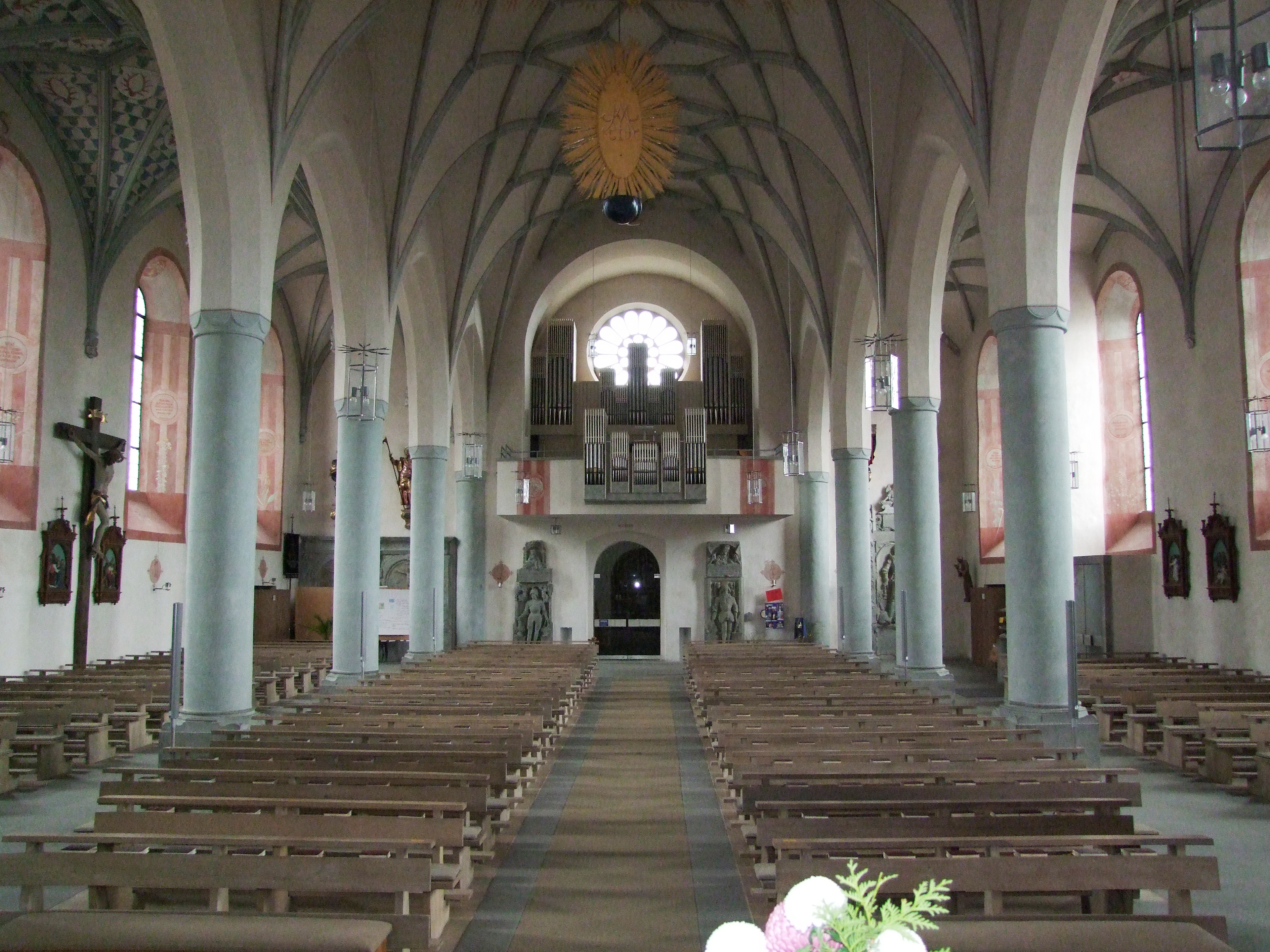 Pfarrkirche St. Philipp und Jakob im oberschwäbischen Bad Grönenbach